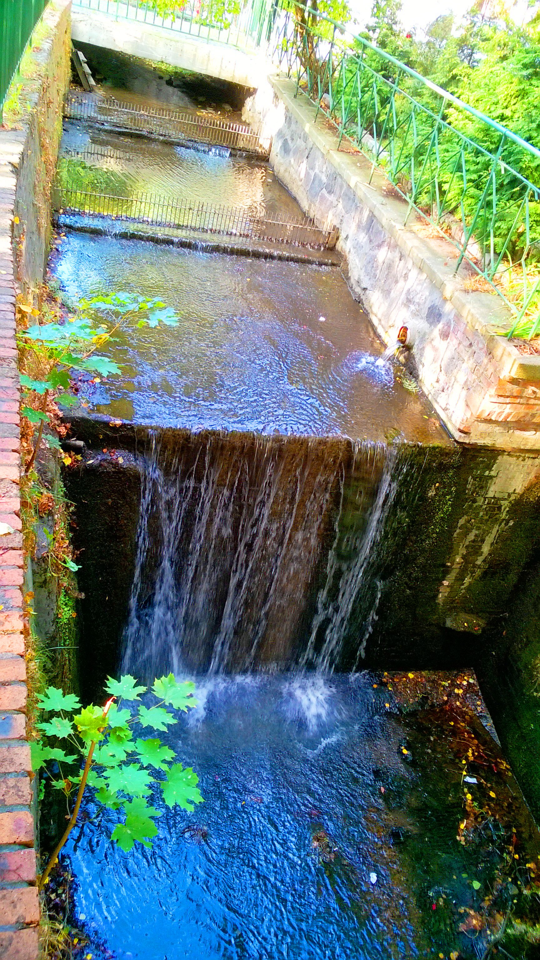 Struga Toruńska11